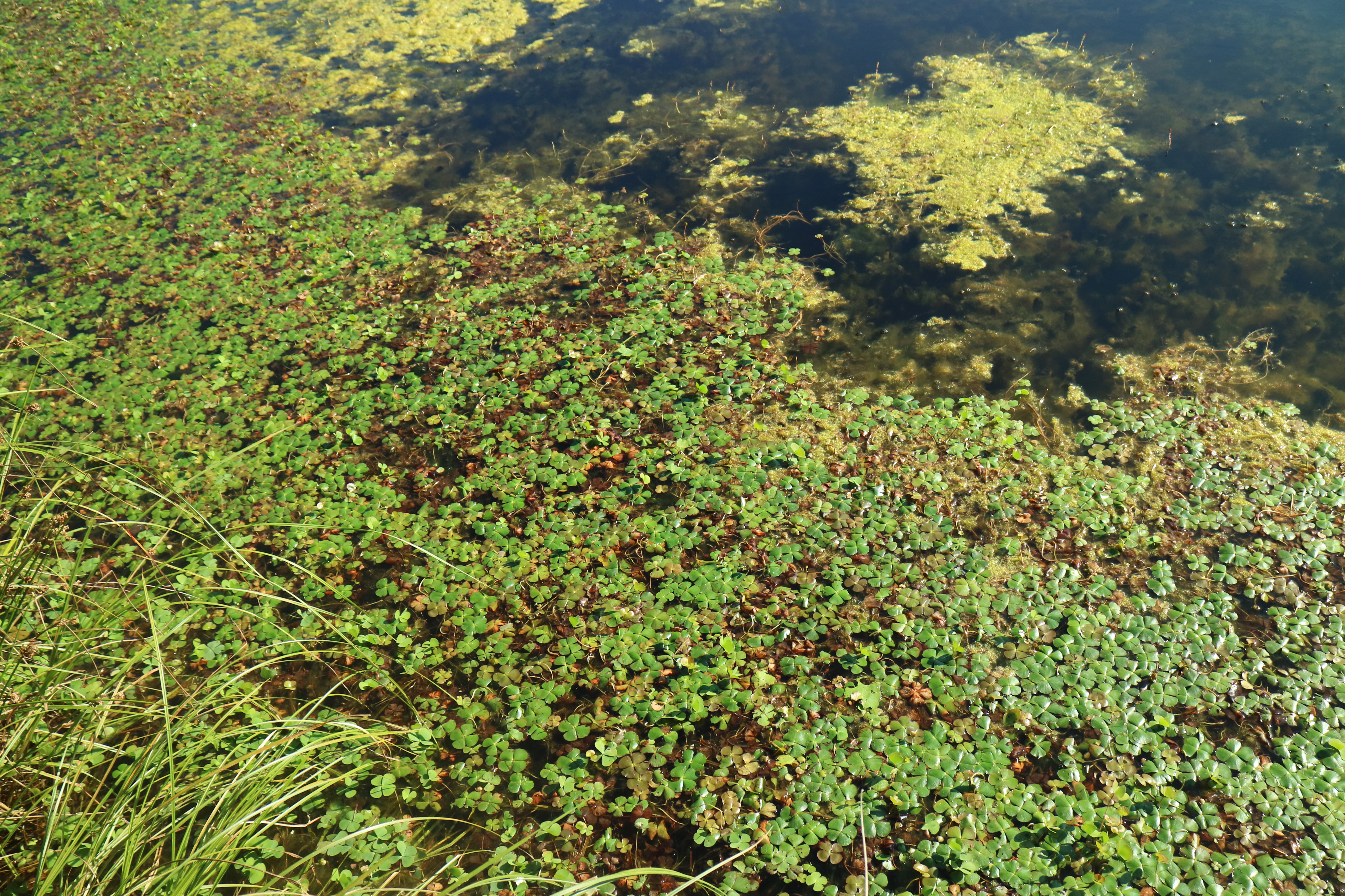 Vierblättriger Kleefarn (Marsilea quadrifolia) auf dem Neuteich, Gemeinde Wundschuh (Steiermark)